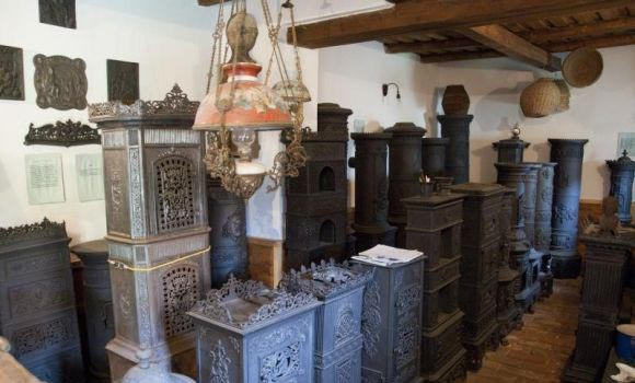 Kályhamúzeum tájházzal